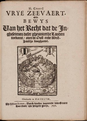 Vrye Zeevaert 1636